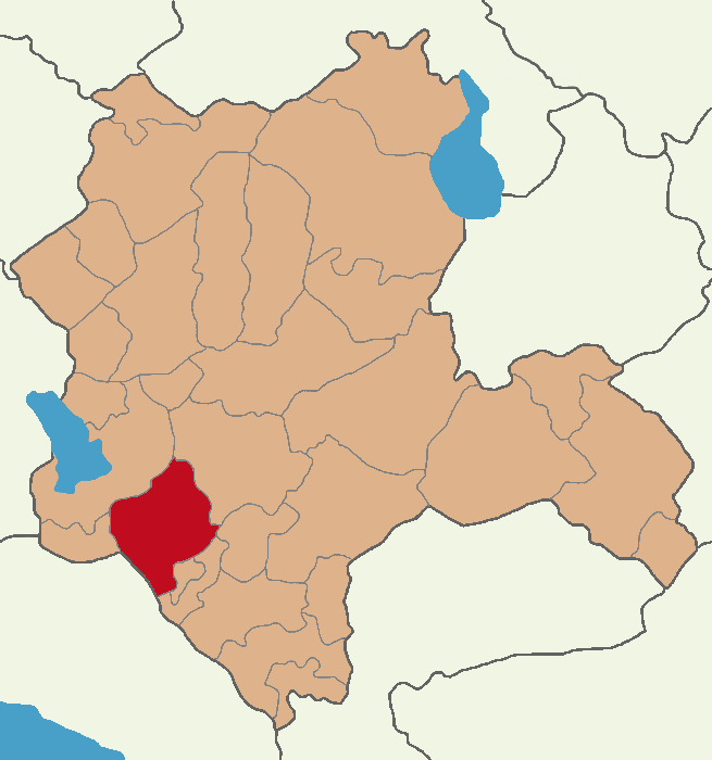 Seydişehir ilçesinin konumu